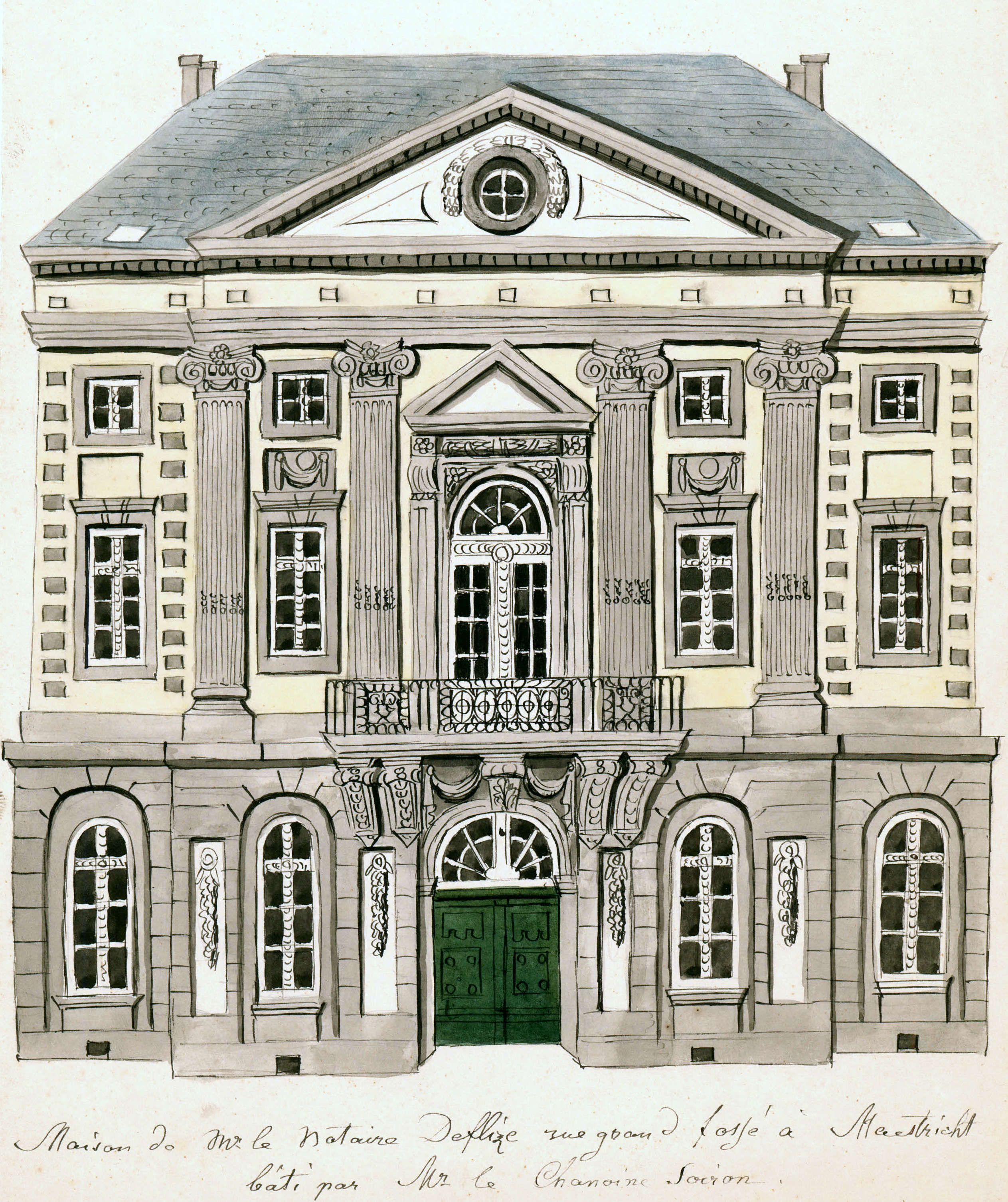 Ingekleurde tekening van Philippe van Gulpen van het Huis Soiron aan de Grote Gracht nr. 82 in Maastricht. Onderschrift: "Maison de Mr. le Notaire Deflize rue grand fossé à Maestricht bâti par Mr. le Chanoine Soiron". Collectie Van der Noordaa in het RHCL, Maastricht, CVDN 220.